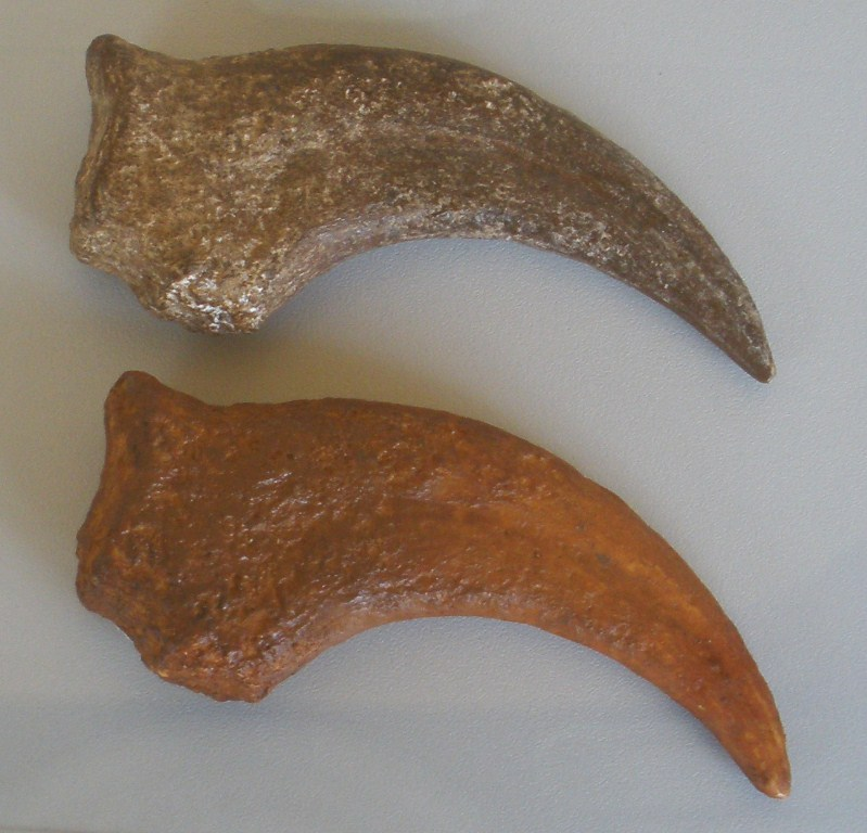 Fossil of Chirostenotes, an extinct theropod- Took the photo at De Groene Poort, Boxtel